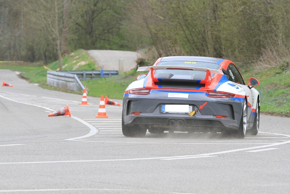 Das Bild zeigt einen Teilnehmer am Porsche Slalom Wettbewerb